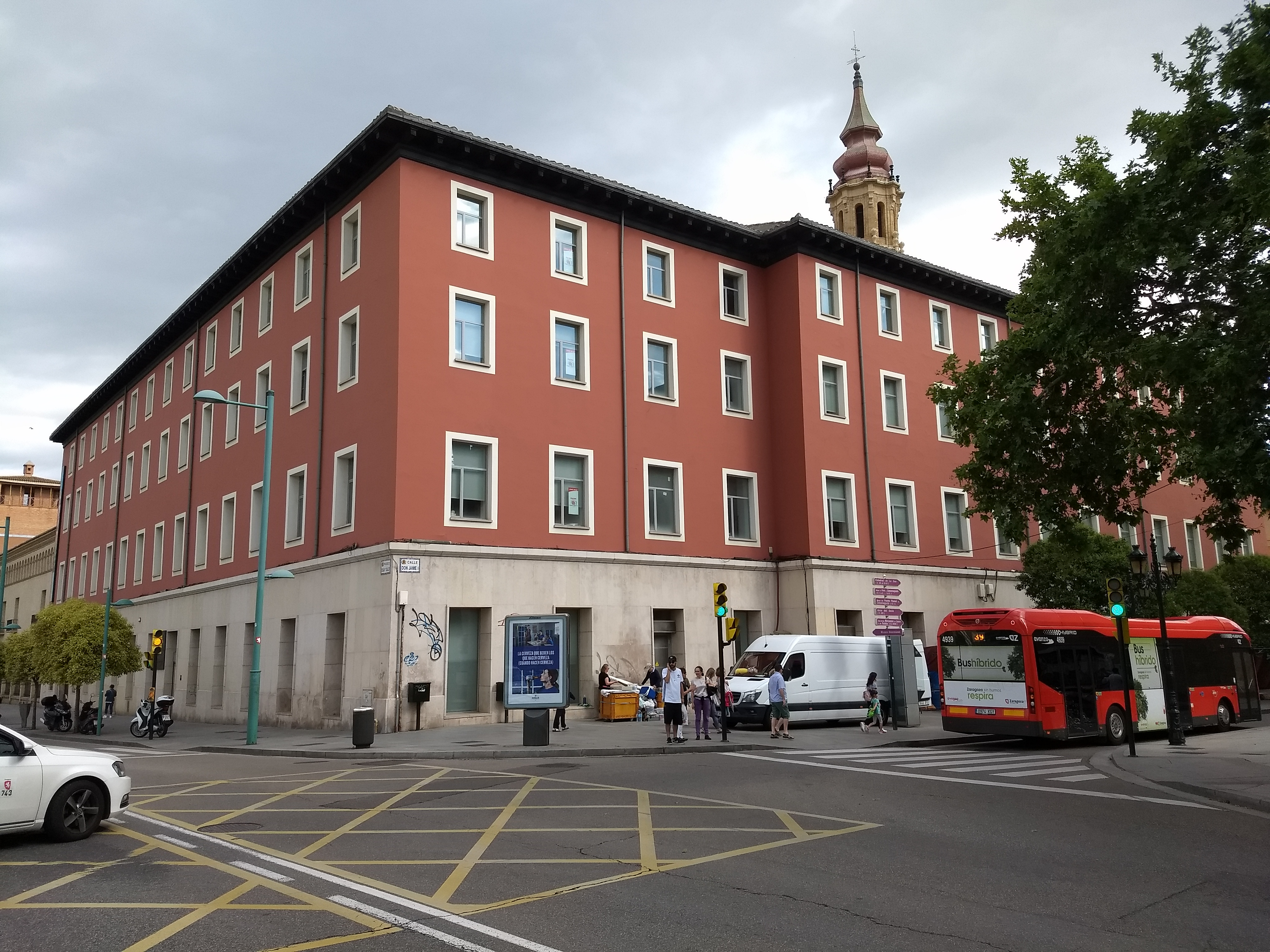 Aragonés: L'antigo seminario construyiu sobre as restas d'as Casas d'el Reino en Zaragoza